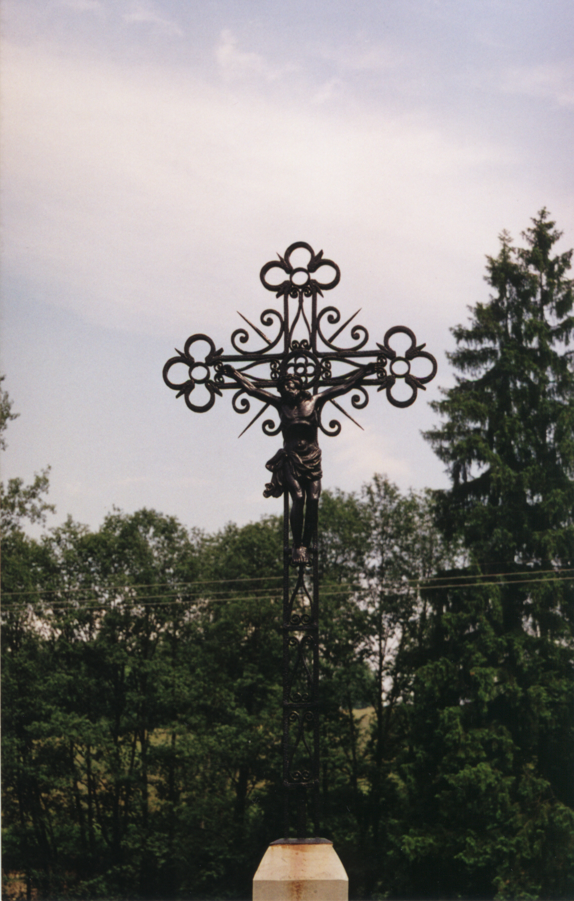 Jeden z przydrożnych krzyży w Hodówce autorstwa Piotra Kułacha